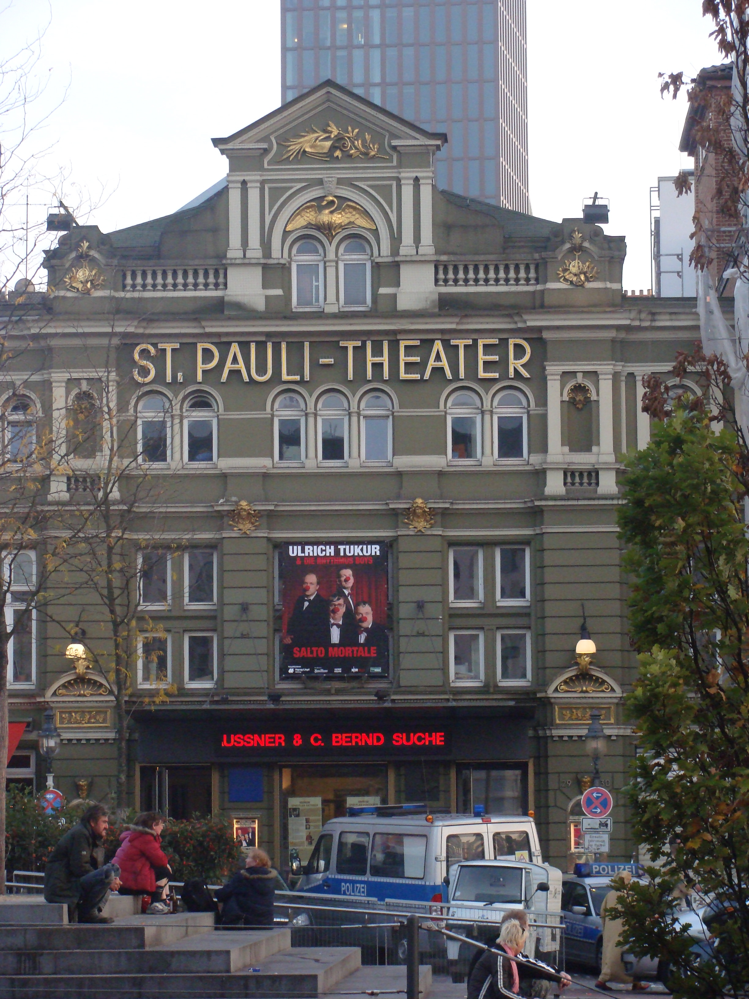 St.-Pauli Theater Hamburg Spielbudenplatz